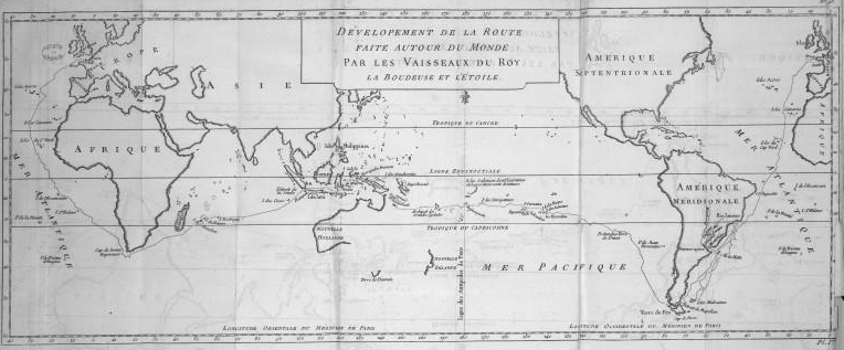 Illustrations de Voyage autour du monde; Louis-Antoine de Bougainville, : Saillant et Nyon (Paris), 1772